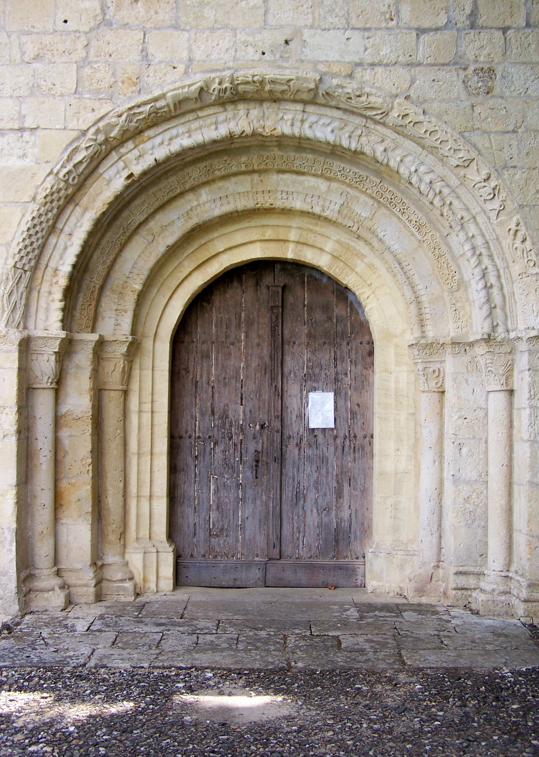 Porche de l'église Saint-Seurin à Gabarnac, Gironde, France